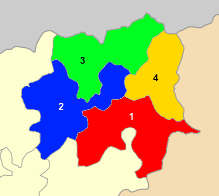 Χάρτης των ενοτήτων (και πρώην δήμων) από τις οποίες αποτελείται ο Δήμος Αρριανών